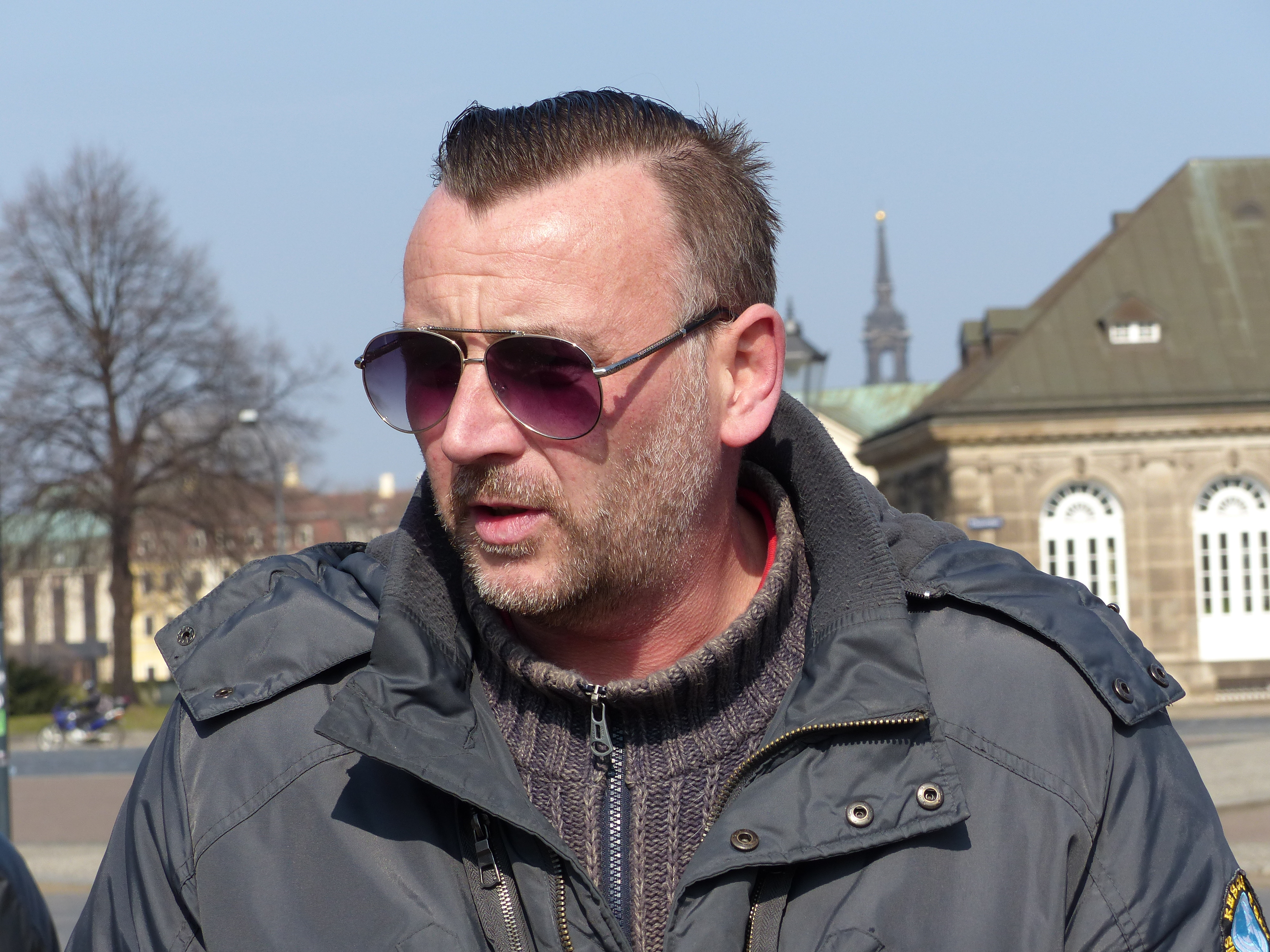 Lutz Bachmann (* 1973), deutscher politischer Aktivist, seit 2014 Vorsitzender der PEGIDA (hier bei einer PEGIDA-Aktion in Dresden).